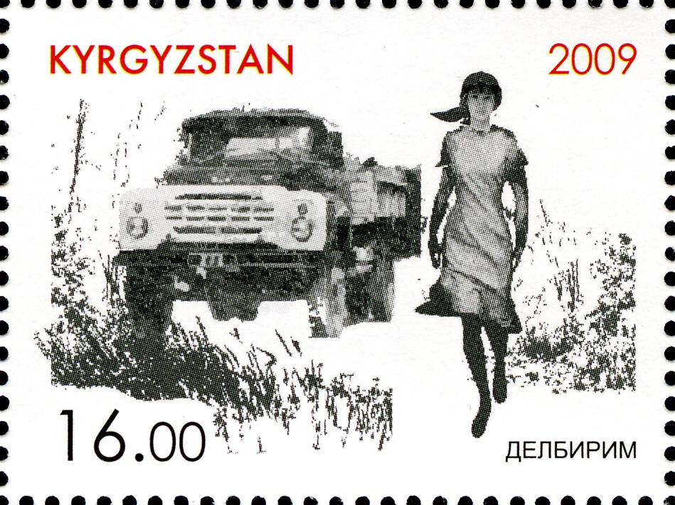 «Chyngyz Aitmatov and his arts» 577-584, number by Kyrgyz catalogue